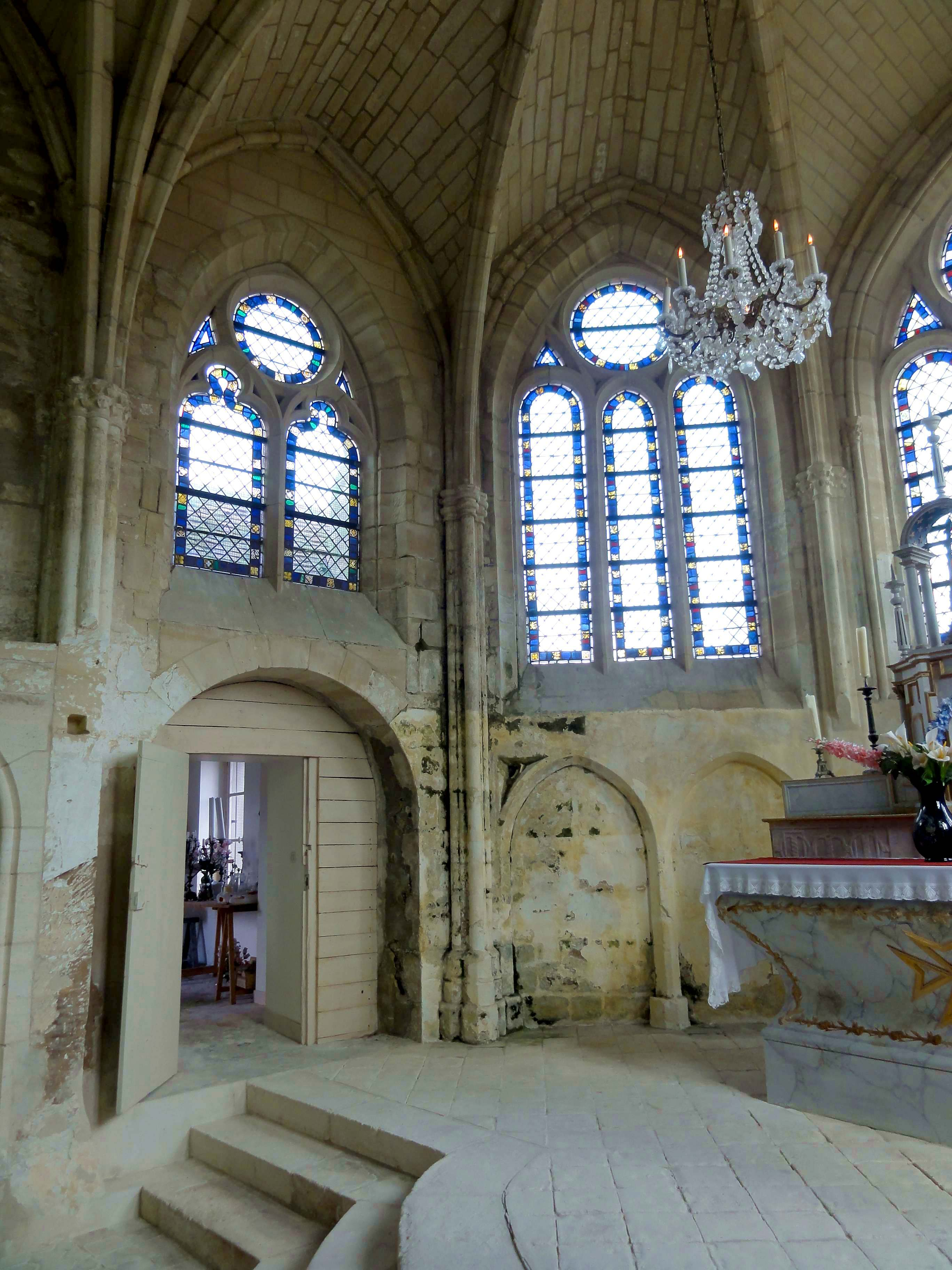 Intérieur de l'église (voir titre).